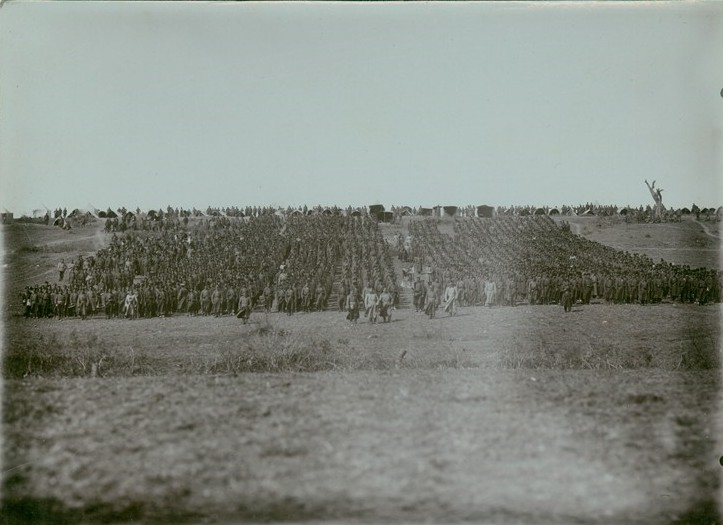 Седемнадесети пехотен доростолски полк, строен преди атака при Чаталджанските позиции.